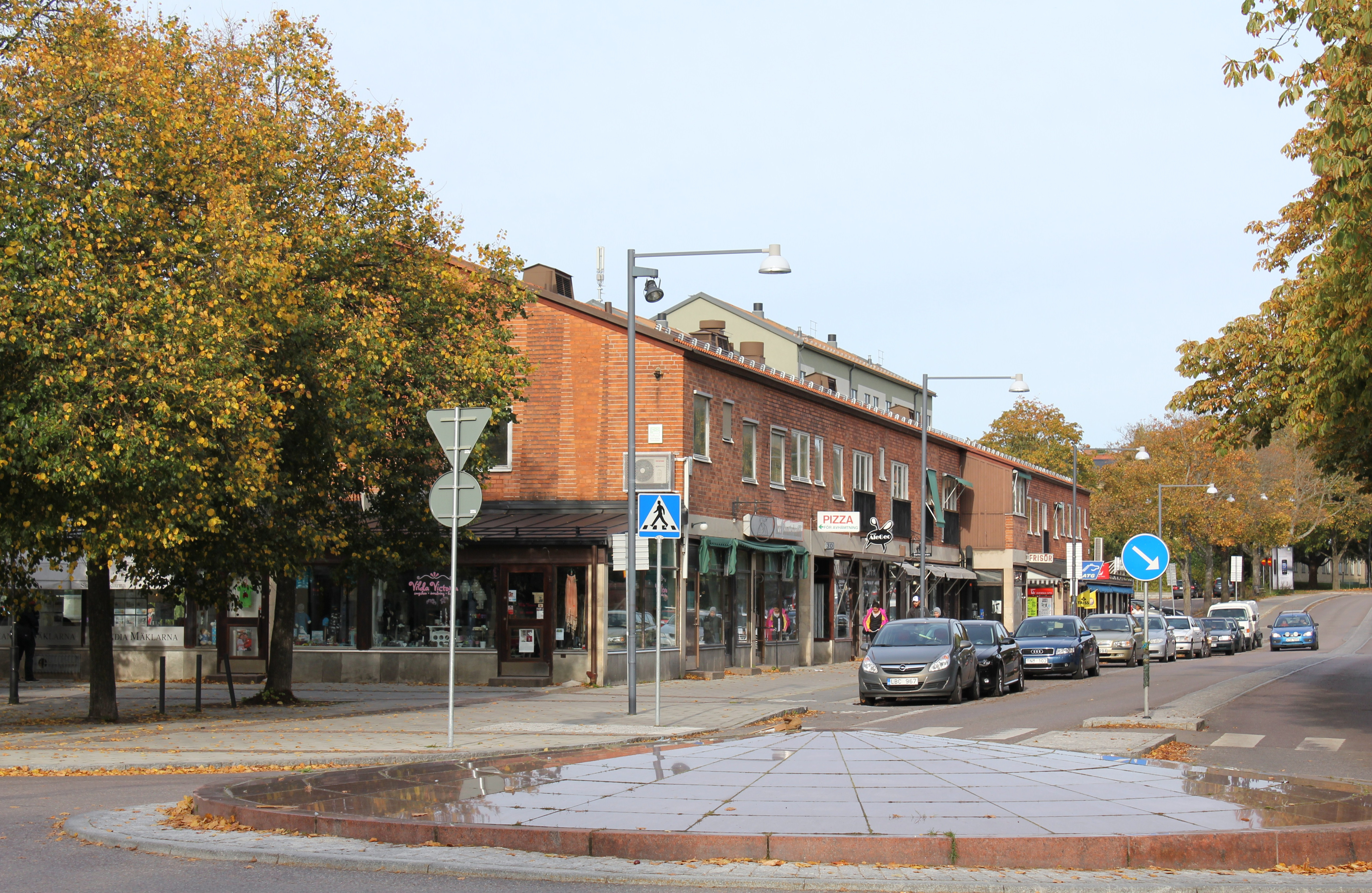 Hjälmarsvägen och Årsta centrums östra länga sedda från korsningen med Årstavägen. Årsta, Stockholm.